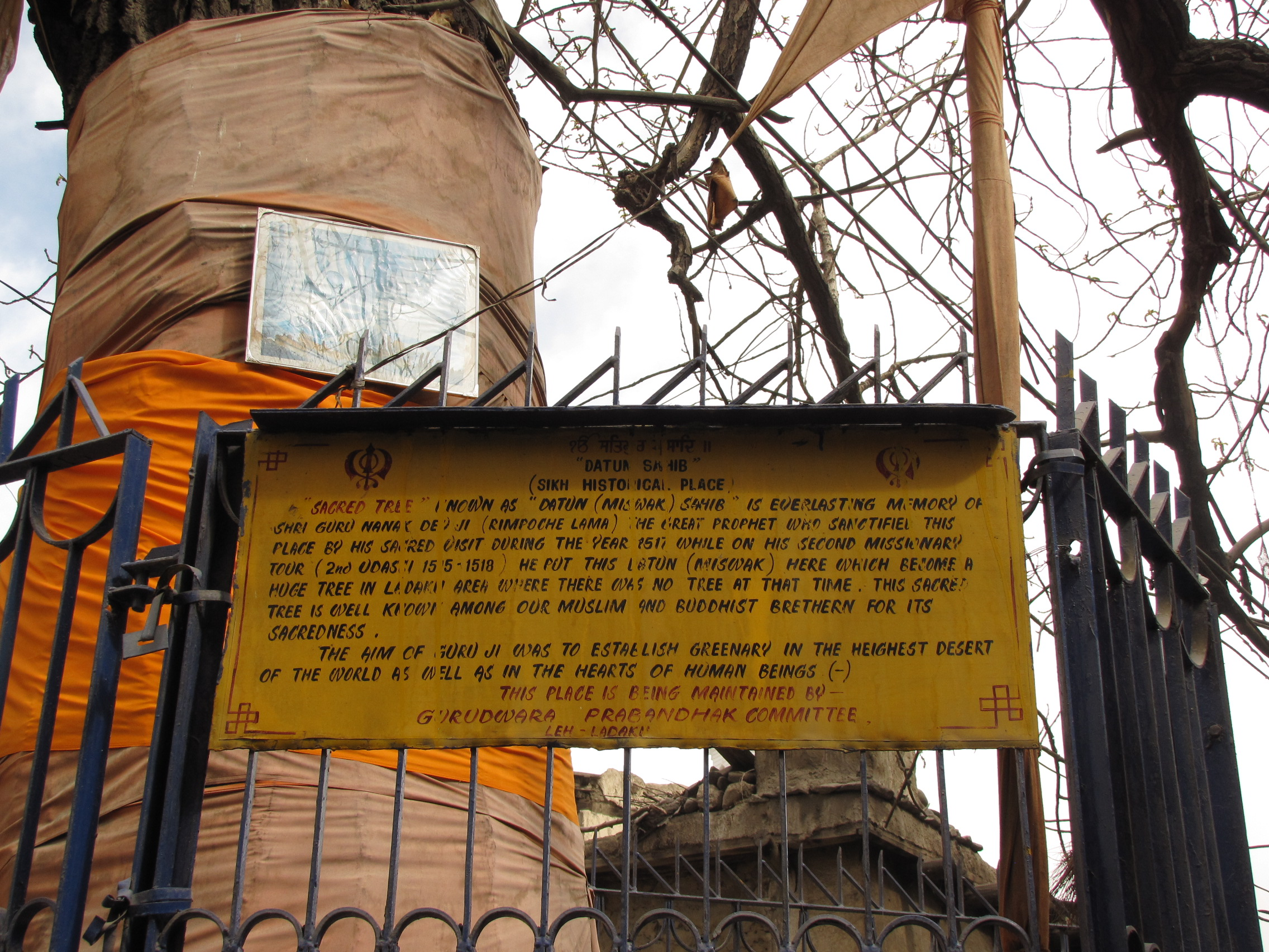 Leh